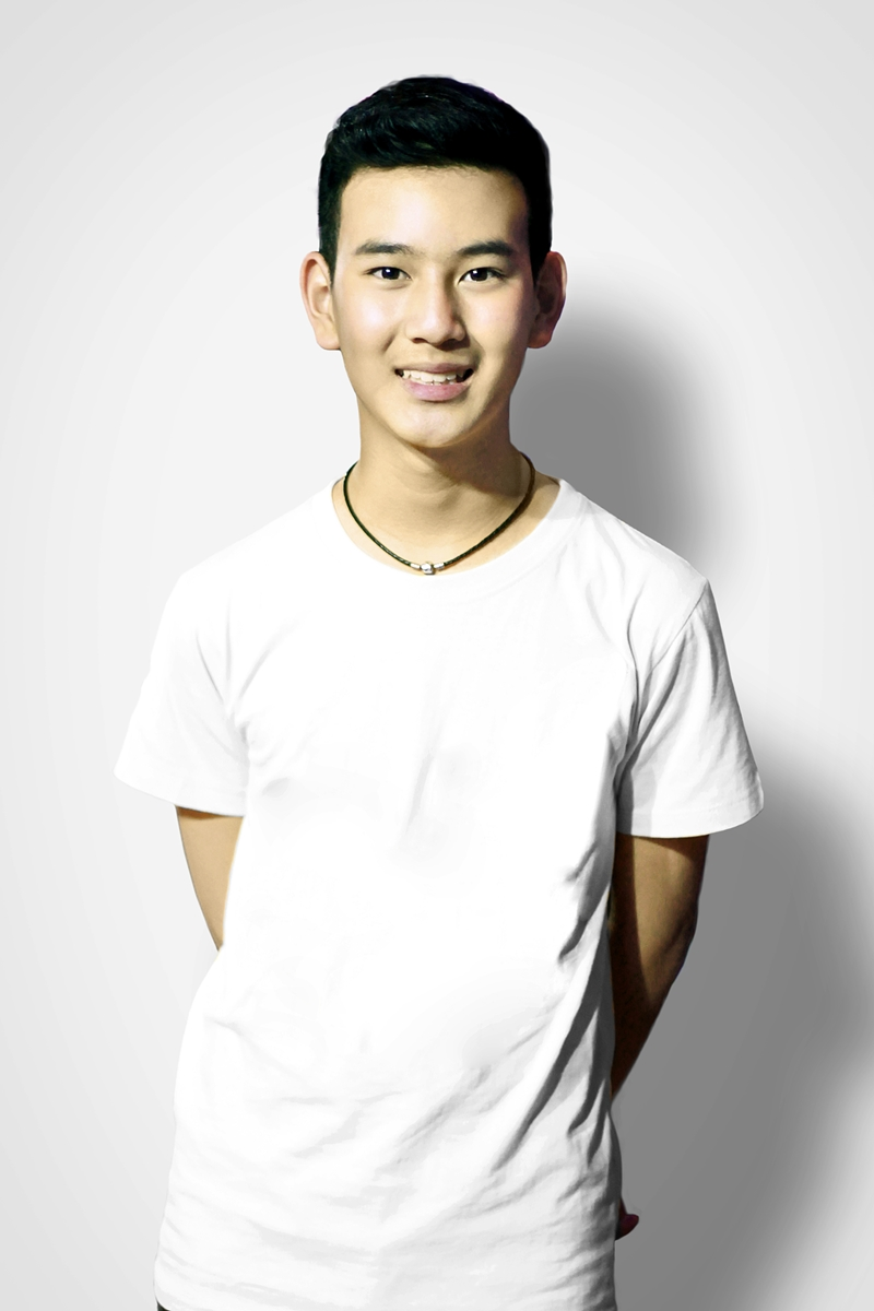 © Cancanisstory This photo is my copyright.